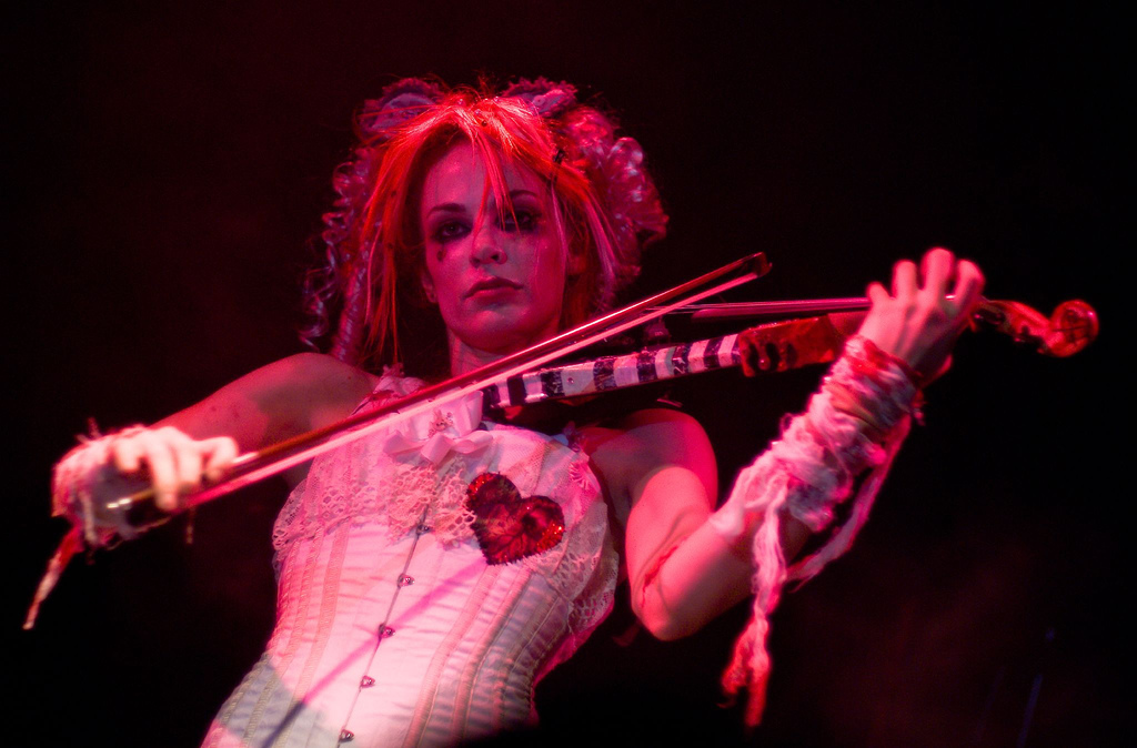 All 54 photos available at